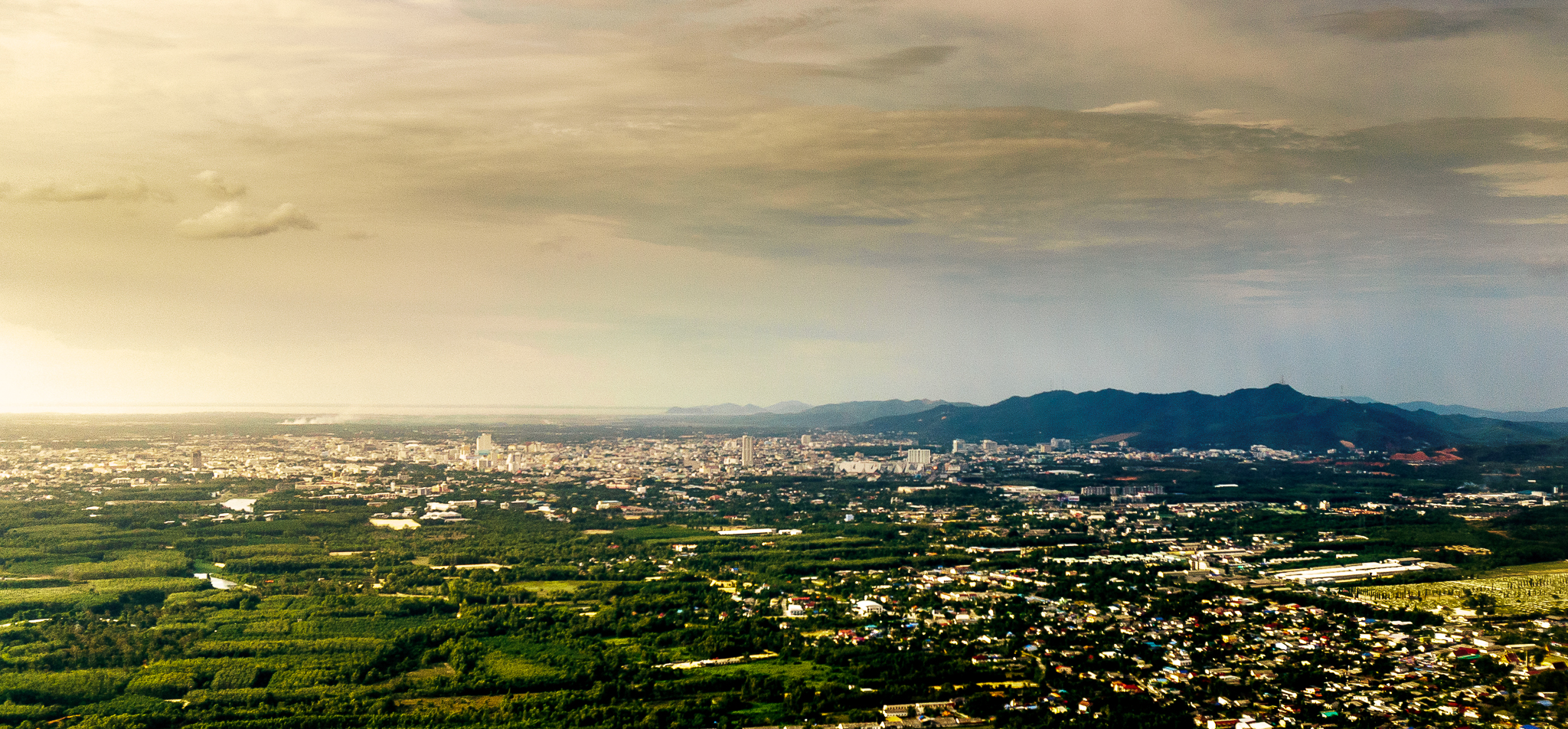 Hatyai 003